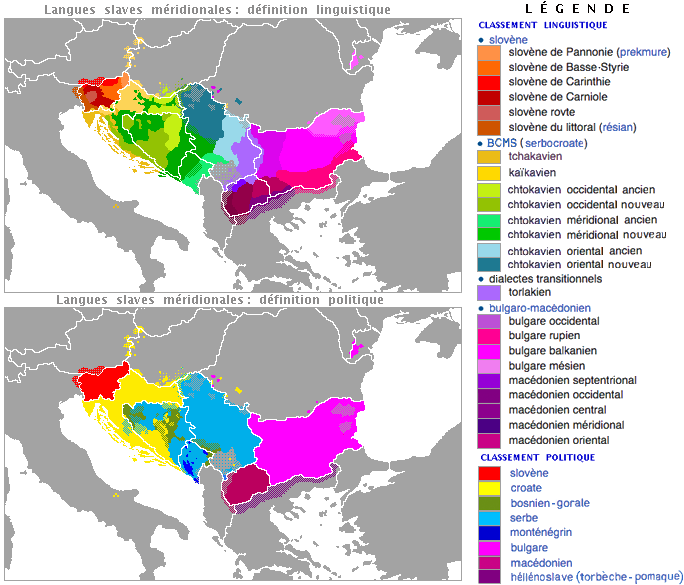 Langues slaves méridionales d'après Jane Garry & Carl Rubino, Facts about the World's Languages: an Encyclopedia of the World's Major Languages, Past and Present, New York 2001 : Holt. pp. 435–439 et H. E. Stier (dir.), Grosser Atlas zur Weltgeschichte, Westermann Verlag 1985, ISBN -3-14-100919-8, p. 151, et selon le fond de carte [1] de Fobos92.